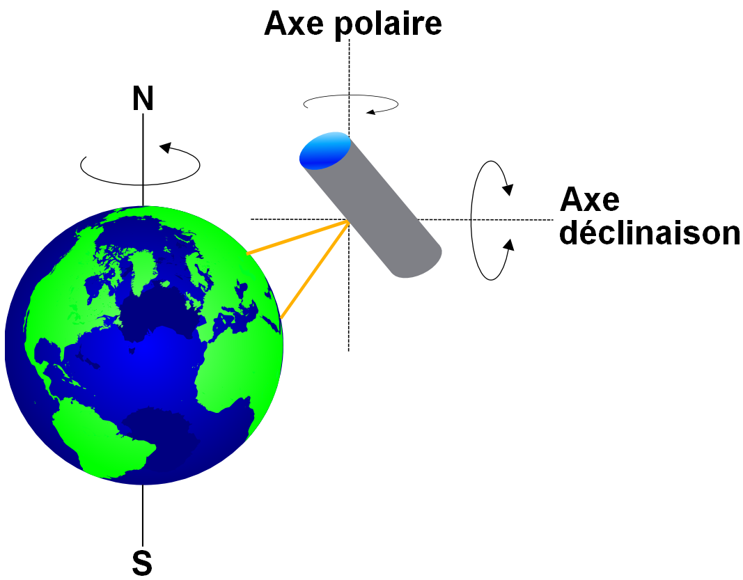 Schéma d'une monture équatoriale (Axes tracés)